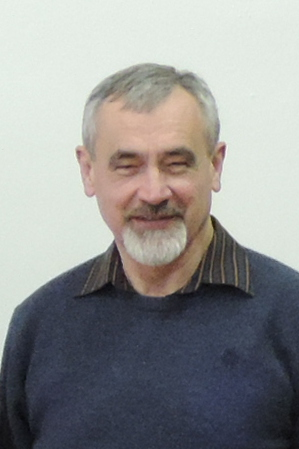 Ján Vajs, slovaka esperantisto, agrikulturisto kaj LKK-ano de Universala Kongreso de Esperanto 2016. Foto devenas de la kunsido de la LKK en Nitra en la 17-a de Januaro 2015.